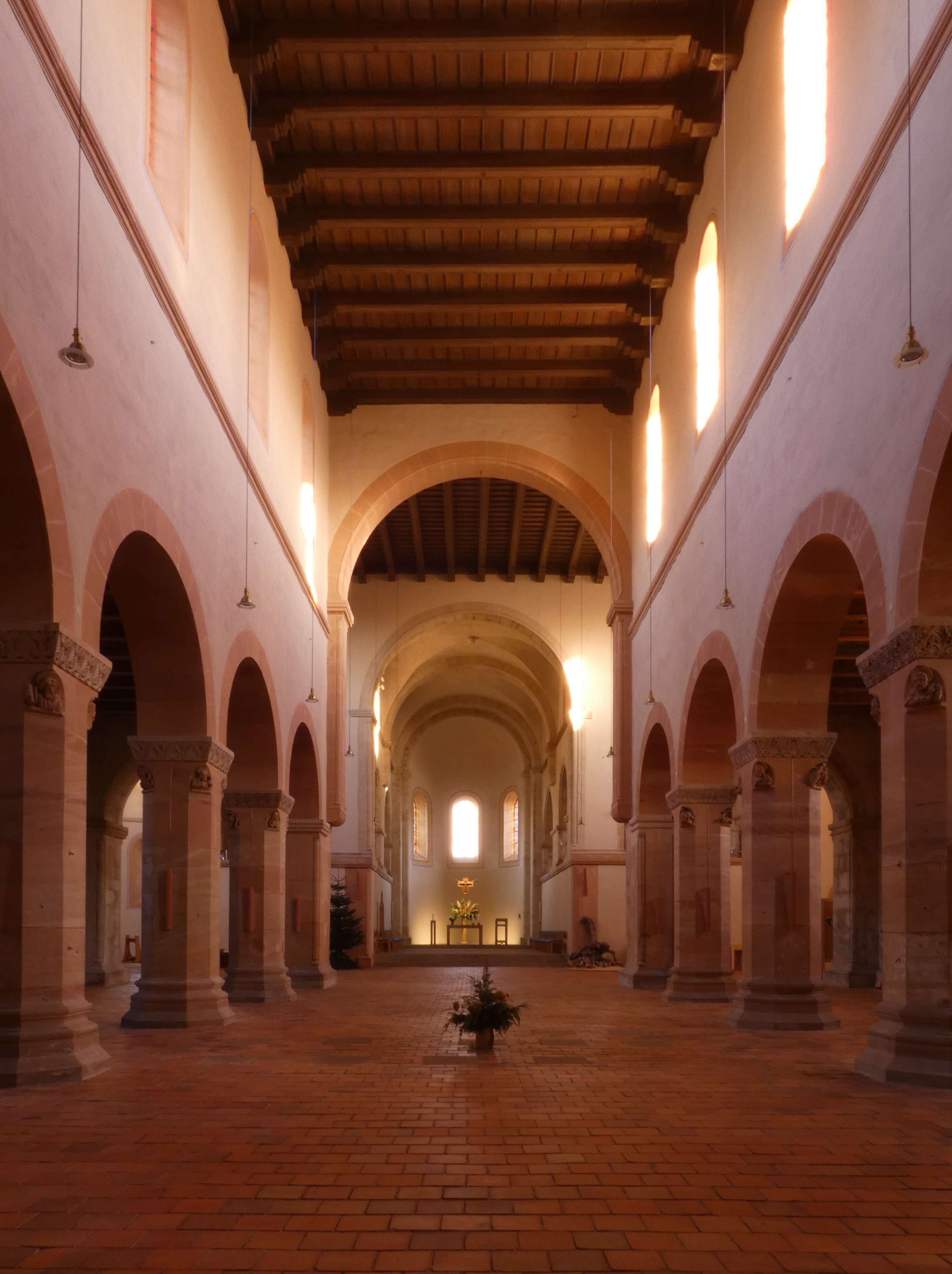 Kirche Petersberg Innenansicht